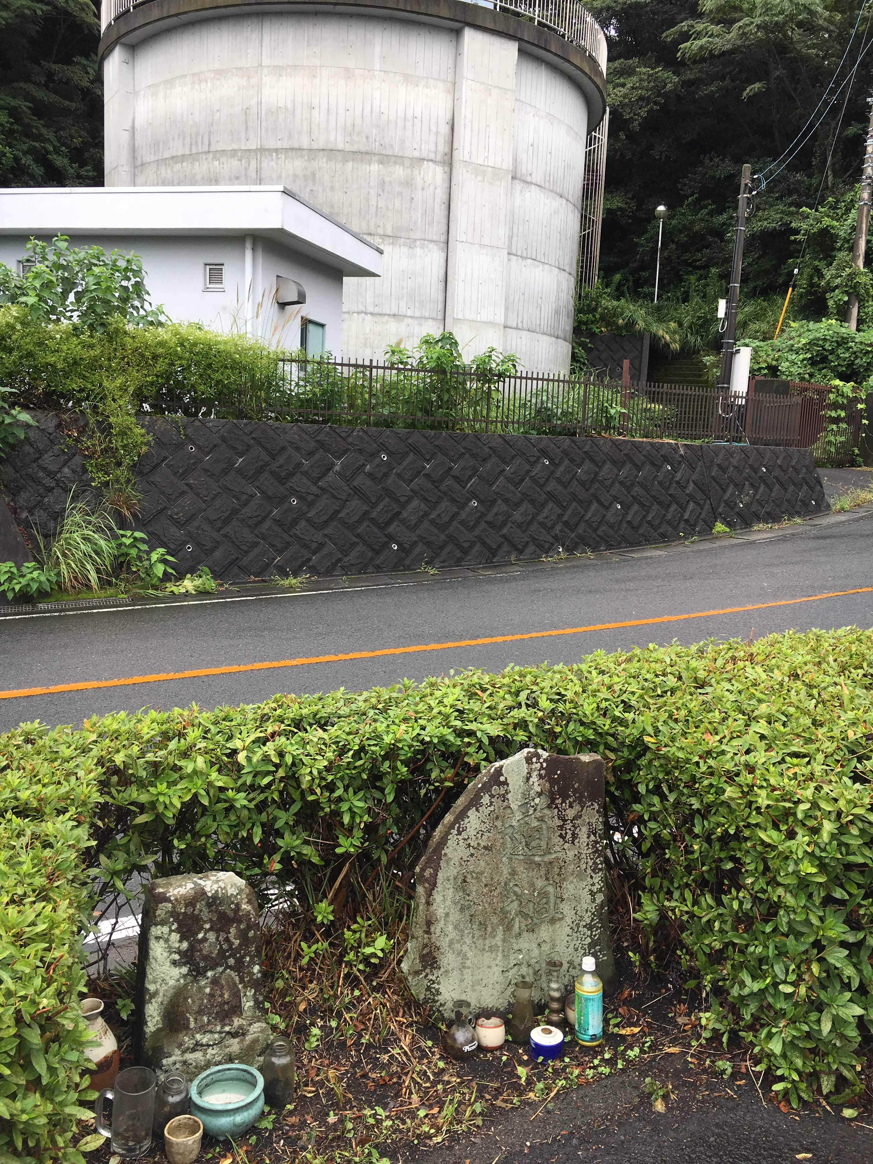 長坂の道祖神